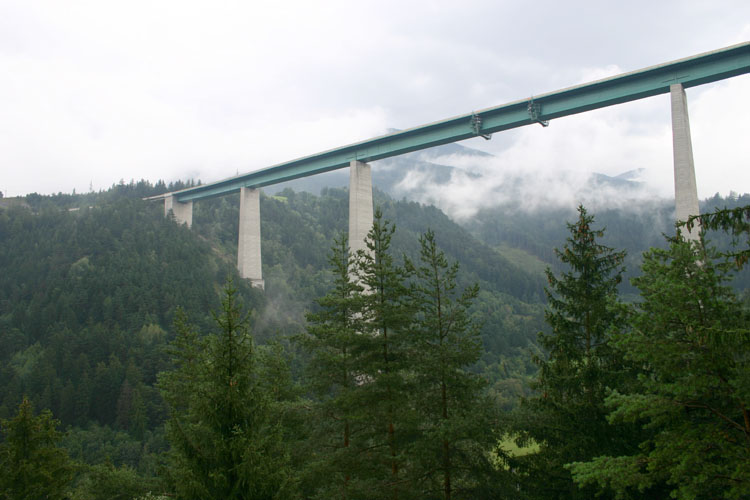 Beschreibung: Europabrücke am Brennerpass, Blick von der Bundesstraße Quelle: Fotografiert am 04.09.2004 Fotograf oder Zeichner: Peter Gerstbach Lizenzstatus: GNU Freie Dokumentationslizenz